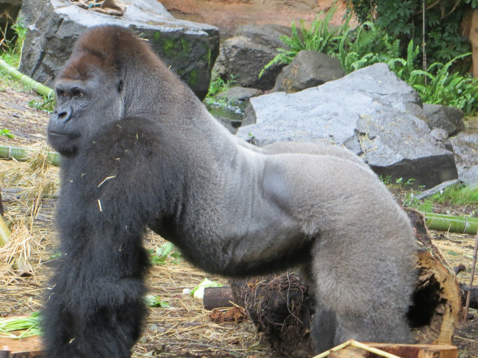 גן החיות בטוקיו, יפן